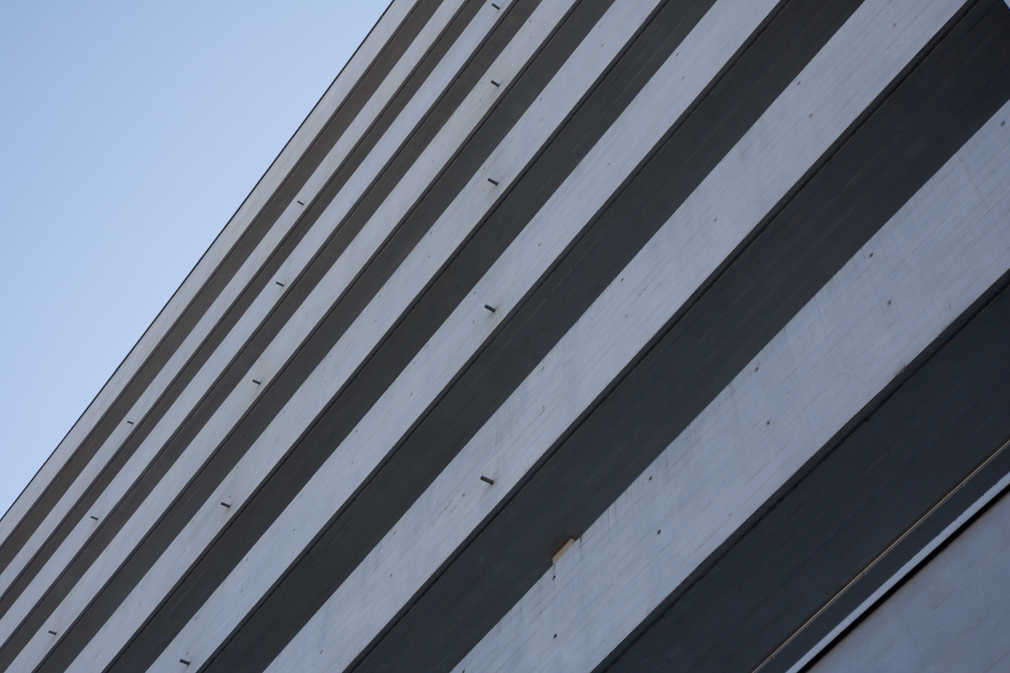 Nordfassade vom Bahnhof Altstetten in Zürich, Schweiz